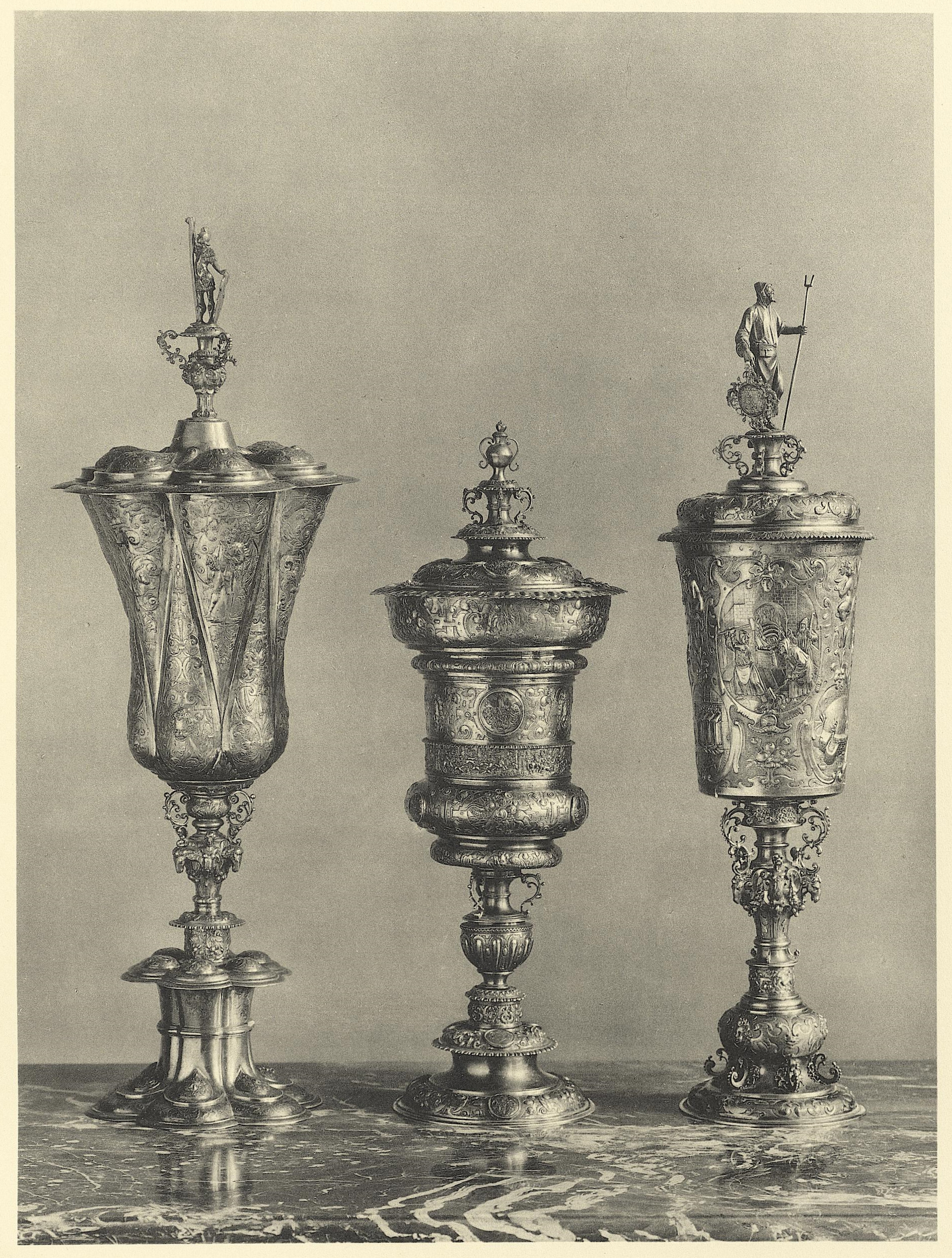 Drei Pokale in den um 1600 vorherrschenden Formen des Aufbaus und der Verzierung: 1. Ageleybecher von Georg Mond, Meister in Dresden vor 1599 / 2. Pokal mit zylindrischem Gefäß von Valentin Grefner, Meister in Dresden 1580 / 3. Pokal mit becherförmigem Gefäß von David Winckler, Meister in Freiberg 1617 (Beschreibung gemäß Quelle) aus: Das Grüne Gewölbe zu Dresden: eine Auswahl von Meisterwerken der Goldschmiedekunst ; in vier Bänden (Band 2): Gefässe, Figuren und Uhren: aus Gold und Silber verziert in reiner Metalltechnik, oder besetzt mit Juwelen, Kameen und Email ; mit 70 Lichtdrucktafeln, davon 7 farbig. Hiersemann, Leipzig